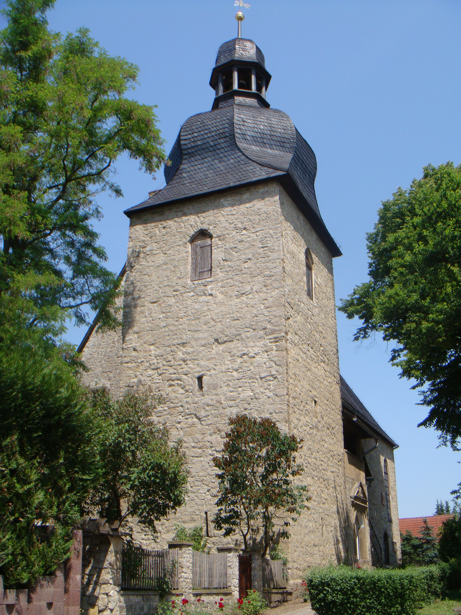 Oßmannstedt Dorfkirche